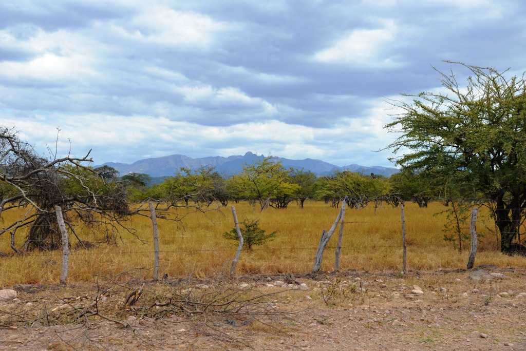 El campo en el municipio de El Jicaral, Nicaragua, entre El Tamarindo y La Mojarra. Vista al norte.